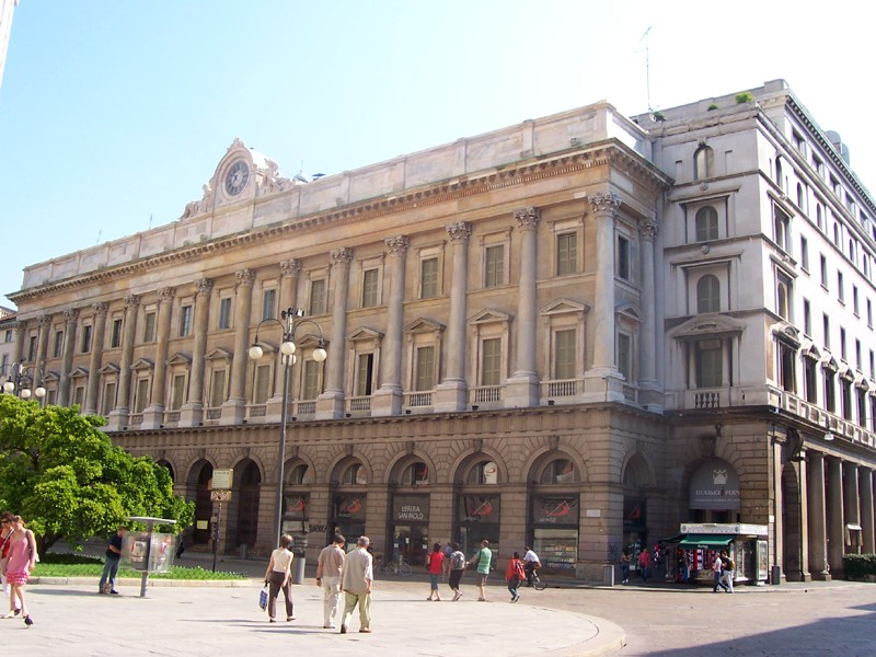 Il Palazzo della Veneranda Fabbrica del Duomo a Milano.